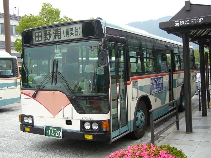 登録番号 福山22く14-20 三原市営バス所属 2006年6月4日 三原駅前にて撮影